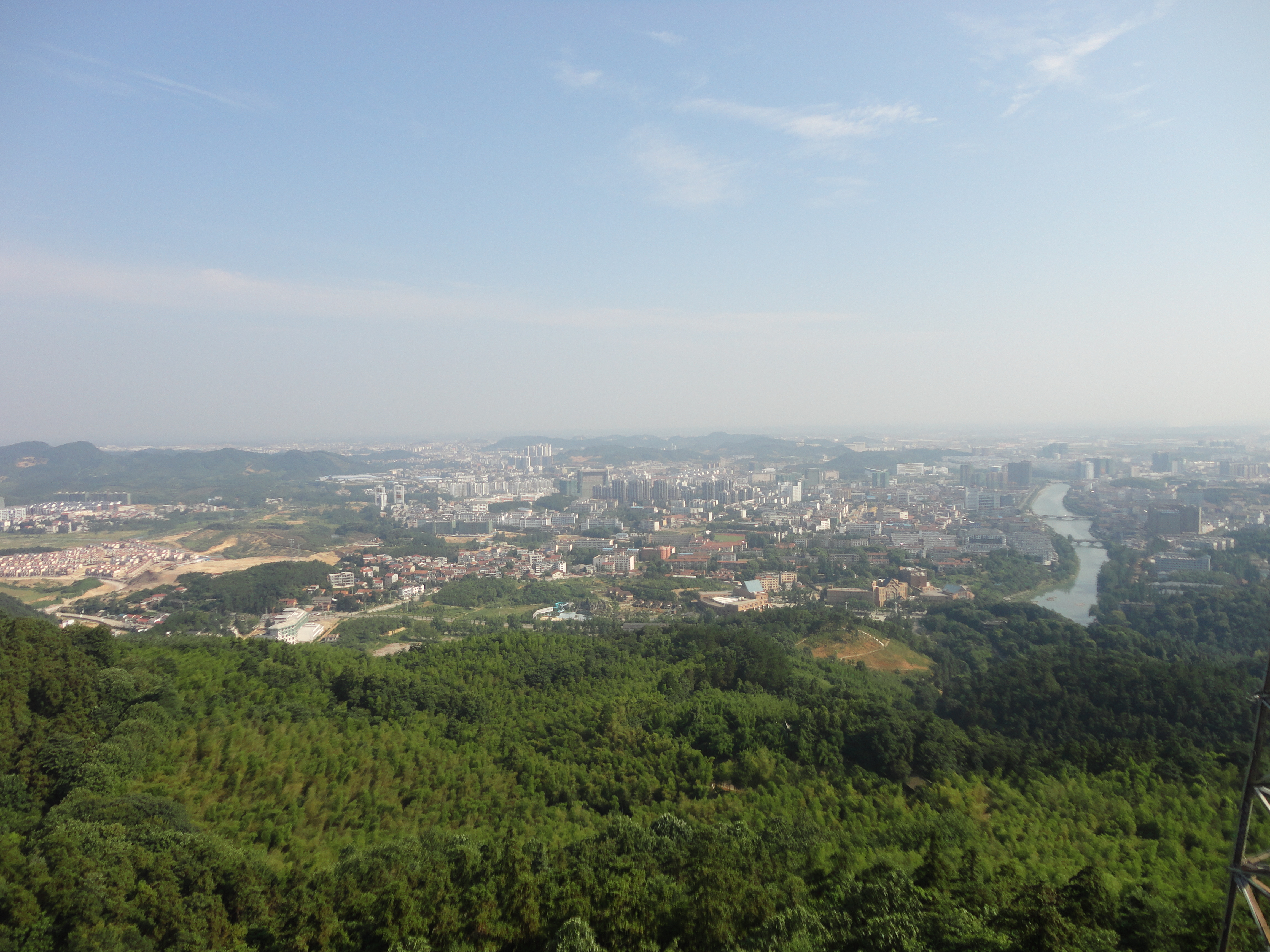 自湖北省咸宁市潜山国家森林公园俯瞰市区